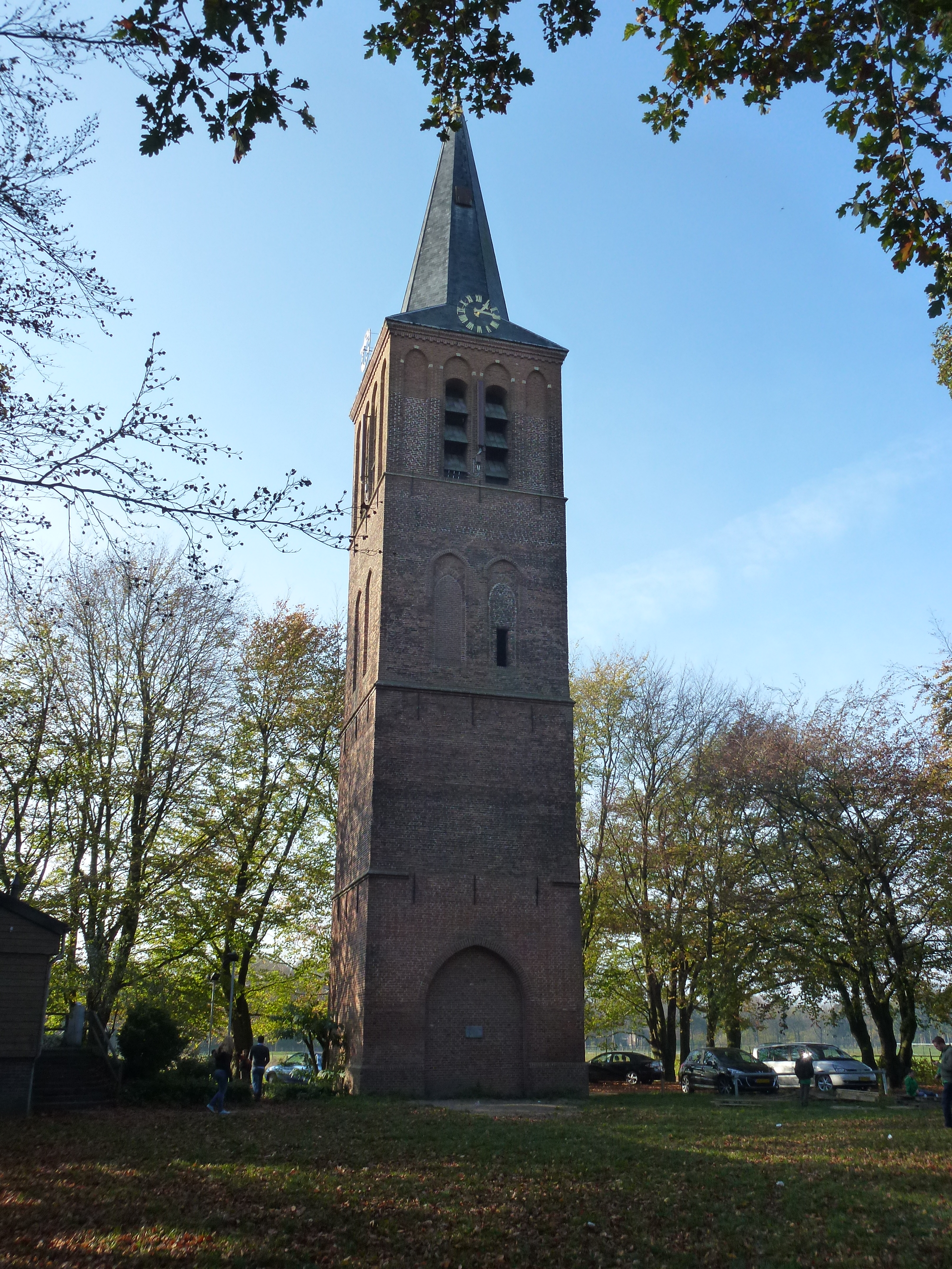 Kerktoren van der Brugghenstraat 43 Stiphout Monument 21455